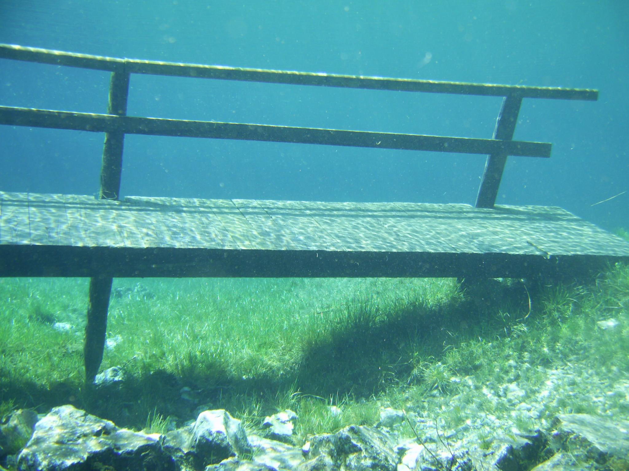 DIGITAL CAMERA 2006 - Grüner See